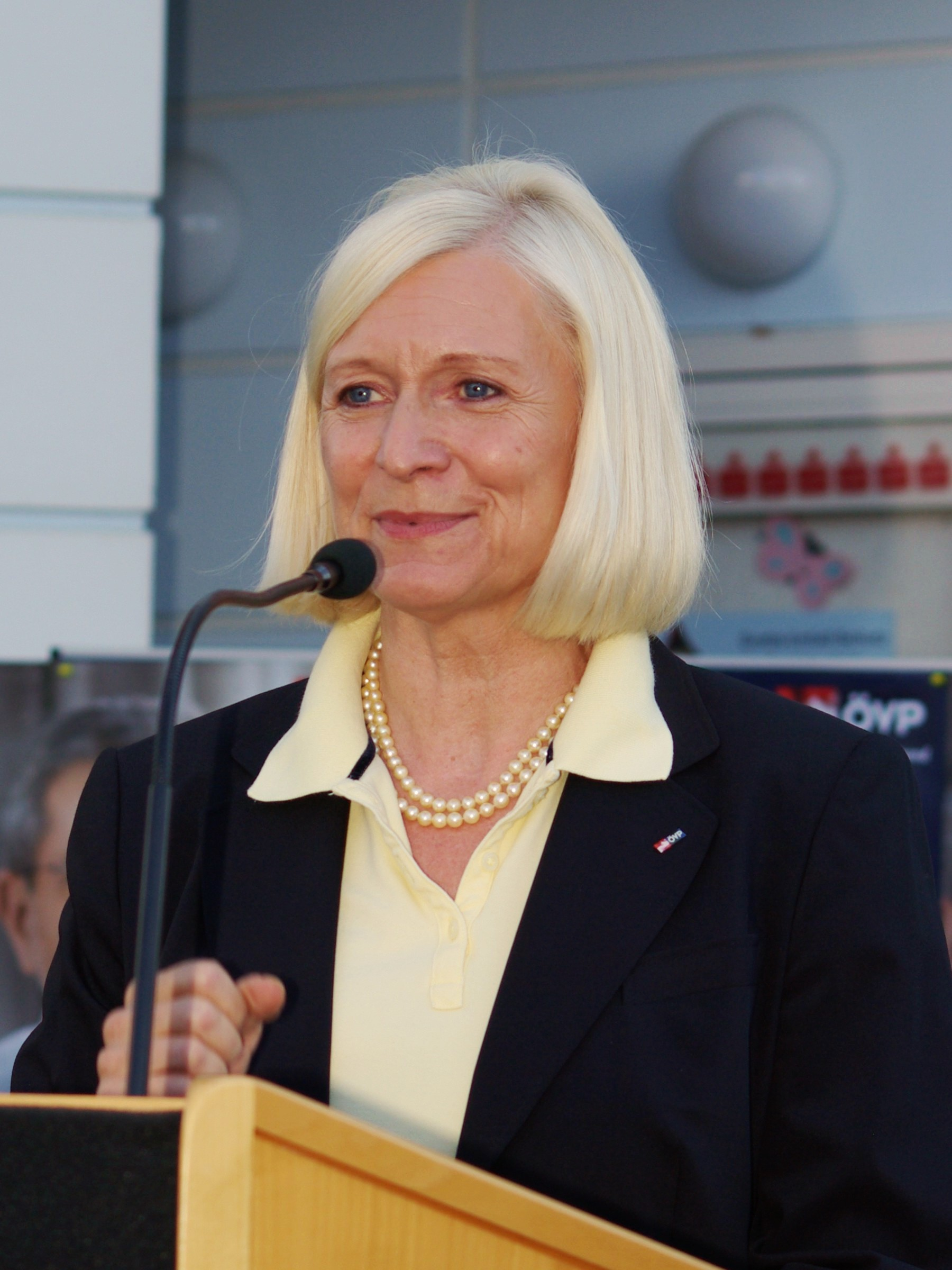 Die österreichische Politikerin Anna Höllerer bei einer Wahlkampfveranstaltung der ÖVP am 8. September 2008 in Gföhl.